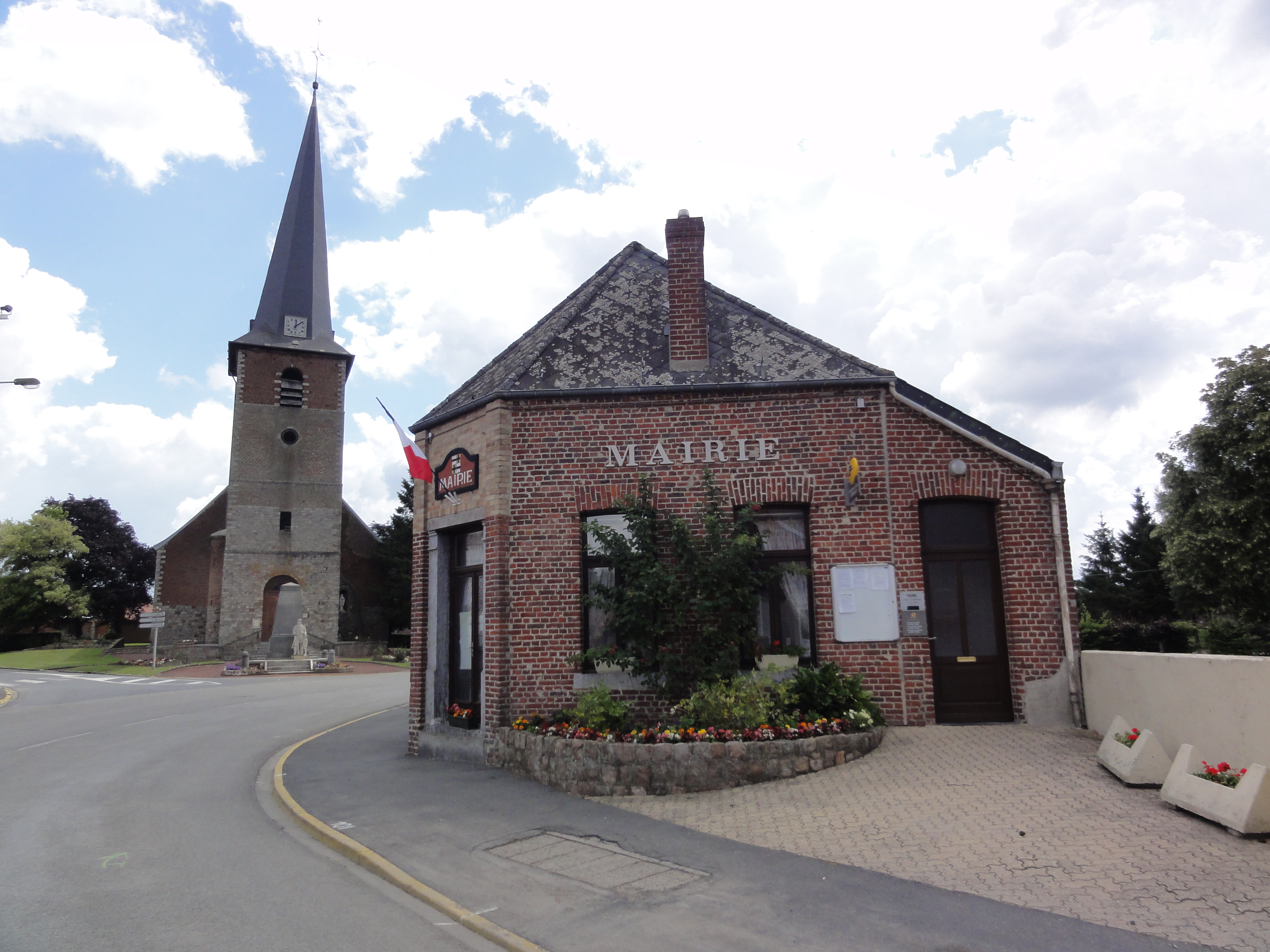 Preux-aux-Bois (Nord, Fr) mairie, église